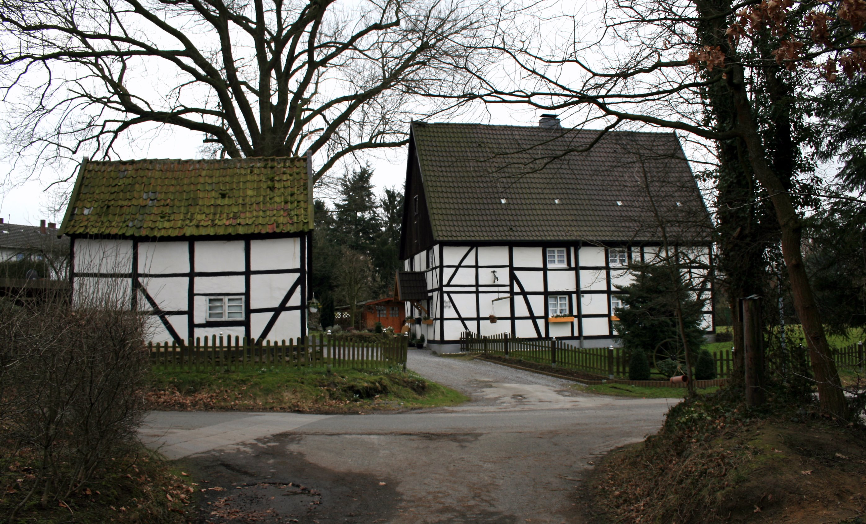 Fachwerkhäuser im Ortsteil Schwitten der Stadt Menden (Sauerland).